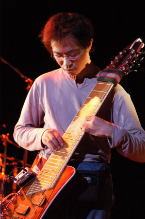 自身の写真